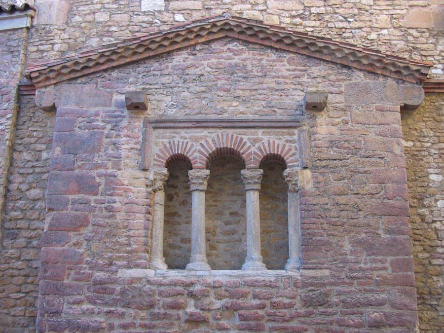 Descripción: Iglesia de San Tirso de Oviedo. Fuente: Foto tomada por Rodrigouf el 21 de octubre de 2005.